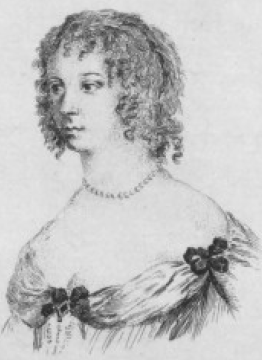 Marie-Thérèse Le Noir de La Thorillière, épouse Carton dite Dancourt, née le 15 juillet 1663 et morte le 11 mai 1725, est une actrice française.